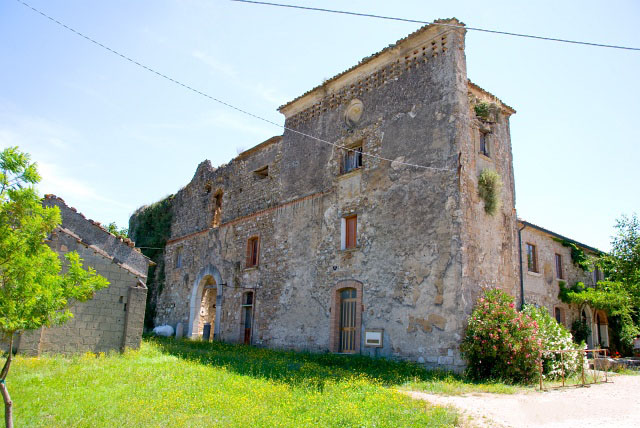 Particolare del Palazzo Federico II, noto anche come Casino del Principe, a Calvi (BN)